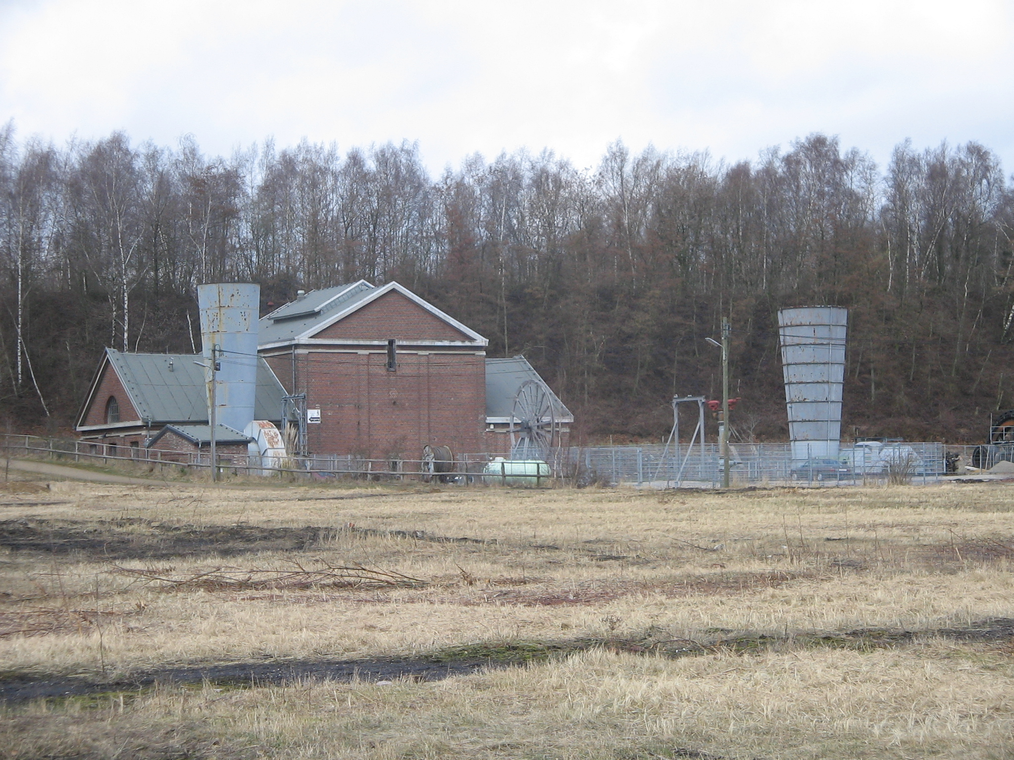 Fördermaschinenhaus Grube Adolf